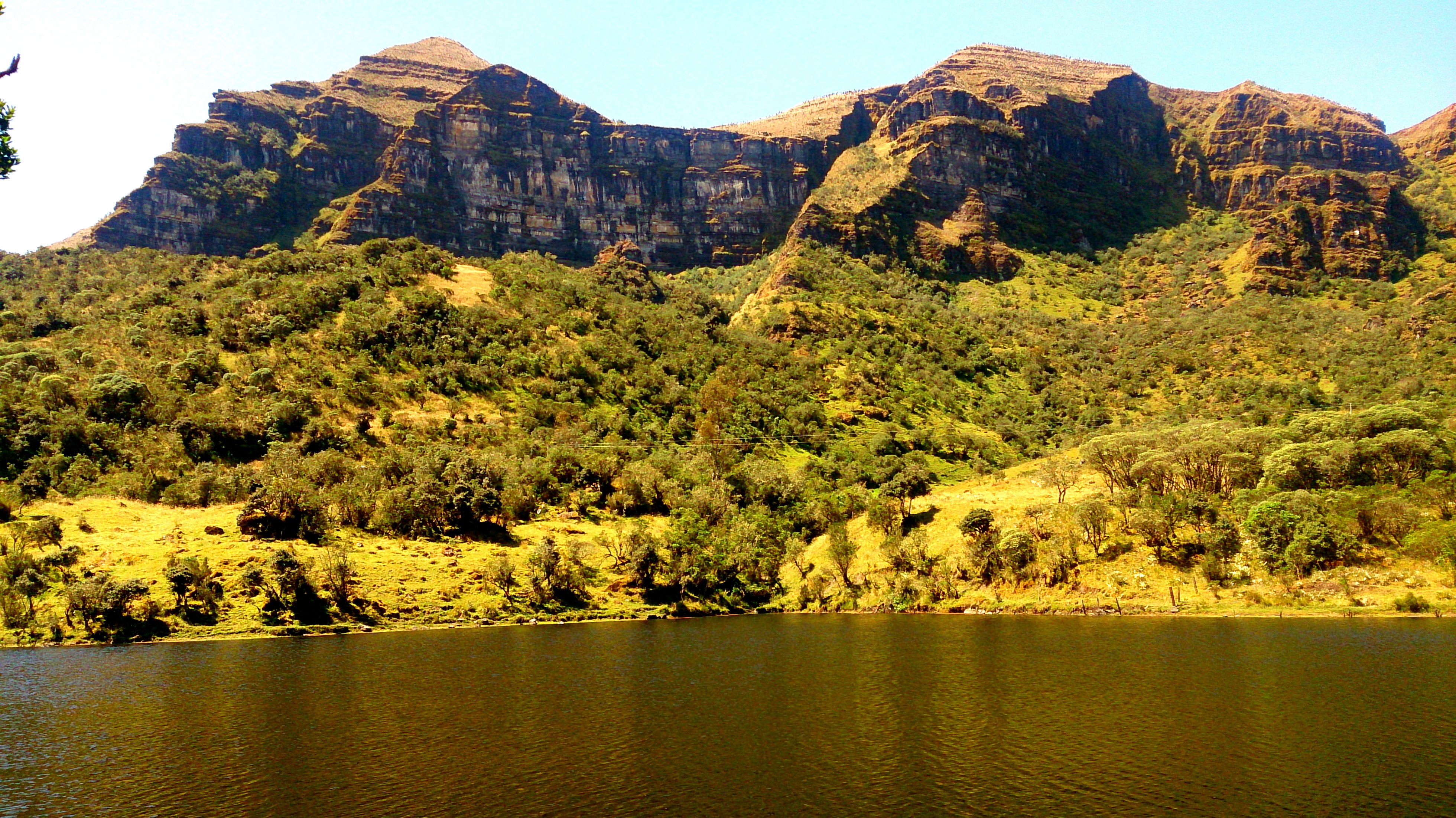 Esta fotografía fue tomada en el municipio colombiano con código 15464.